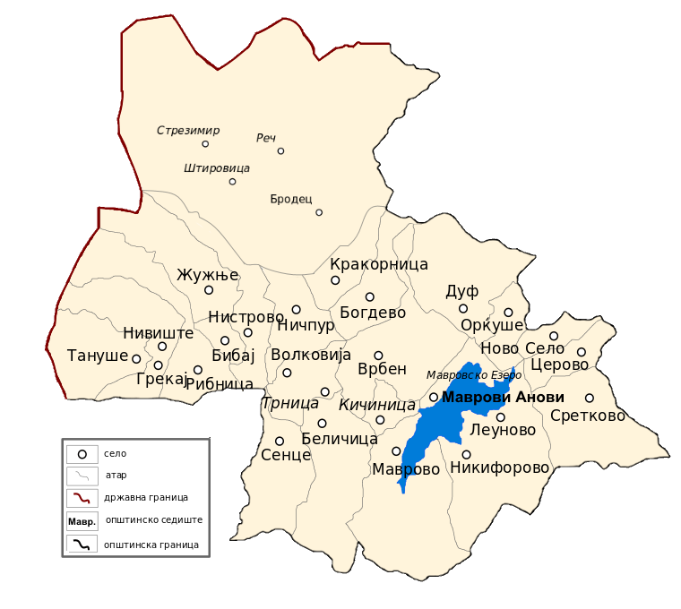 Карта на општина Маврови Анови со селските атари.